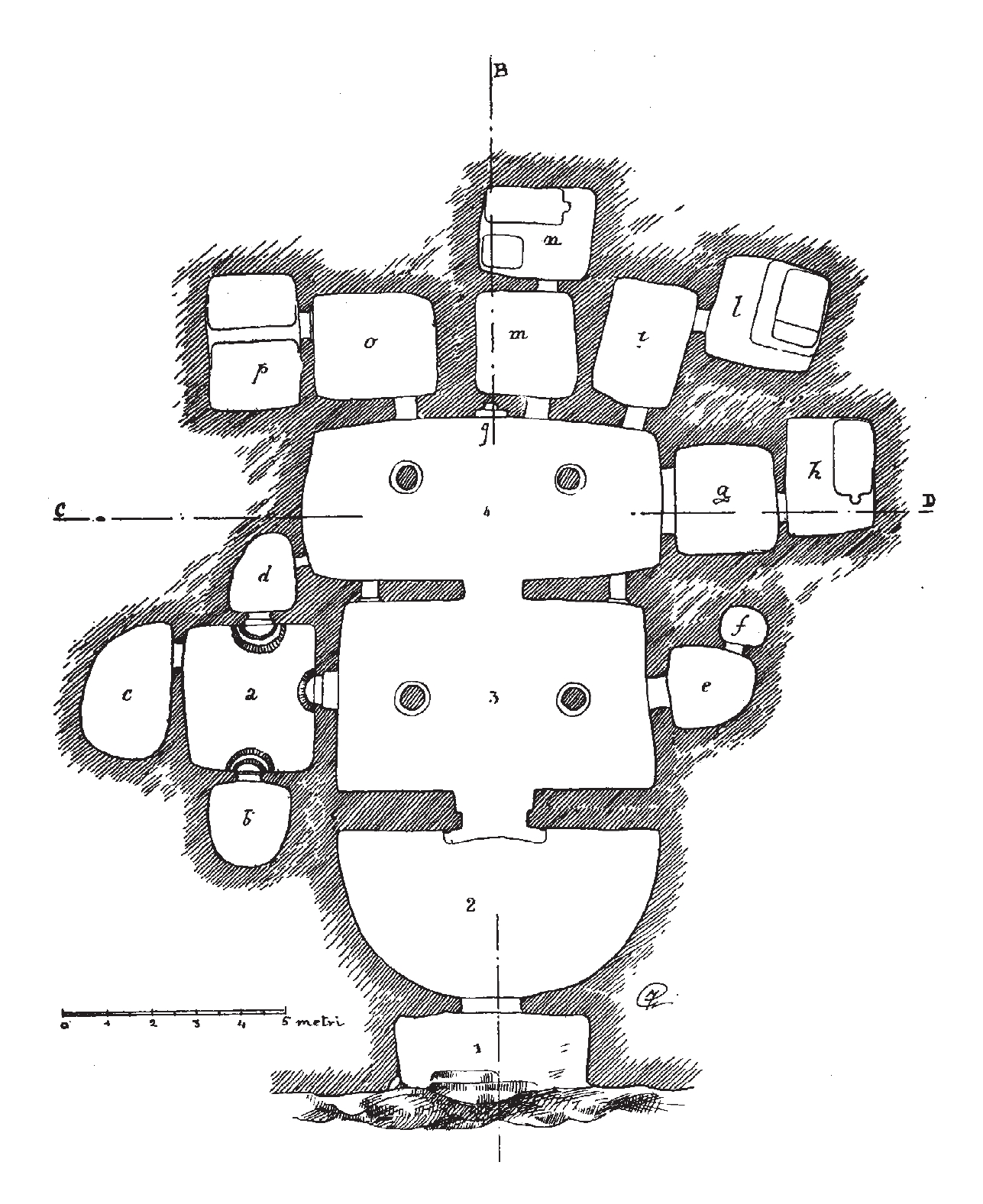 Disegno di Antonio Taramelli